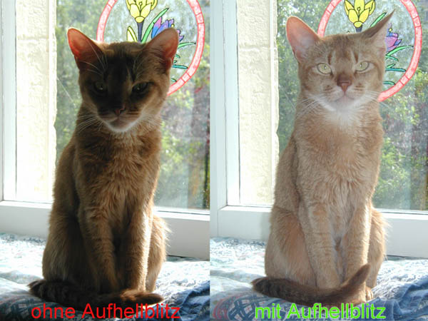 Beispiel zur Darstellung des Aufhellblitzes